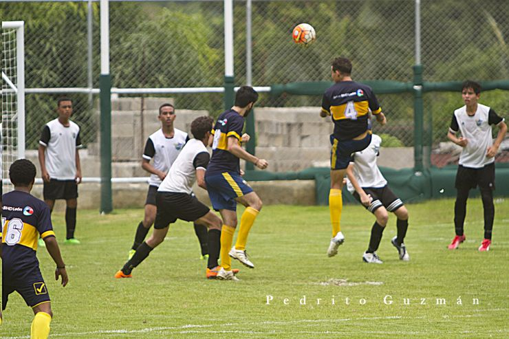 DownTown Soccer Academy visita al Club Atlético Pantoja para celebrar un partido amistoso en su campo.